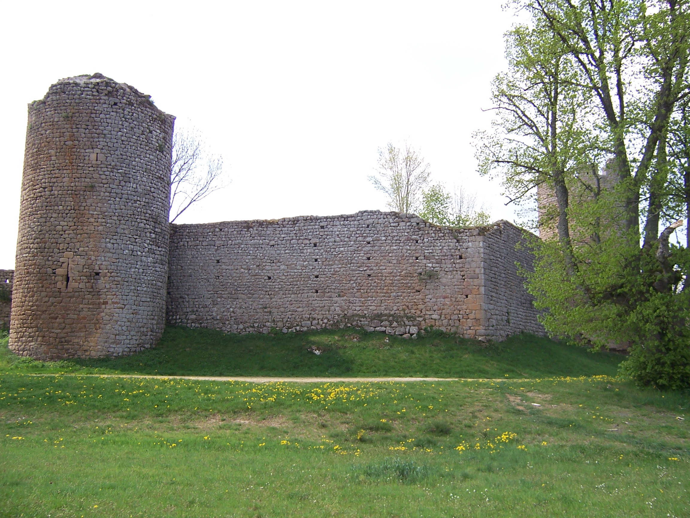 Entré du chateau de Viverols